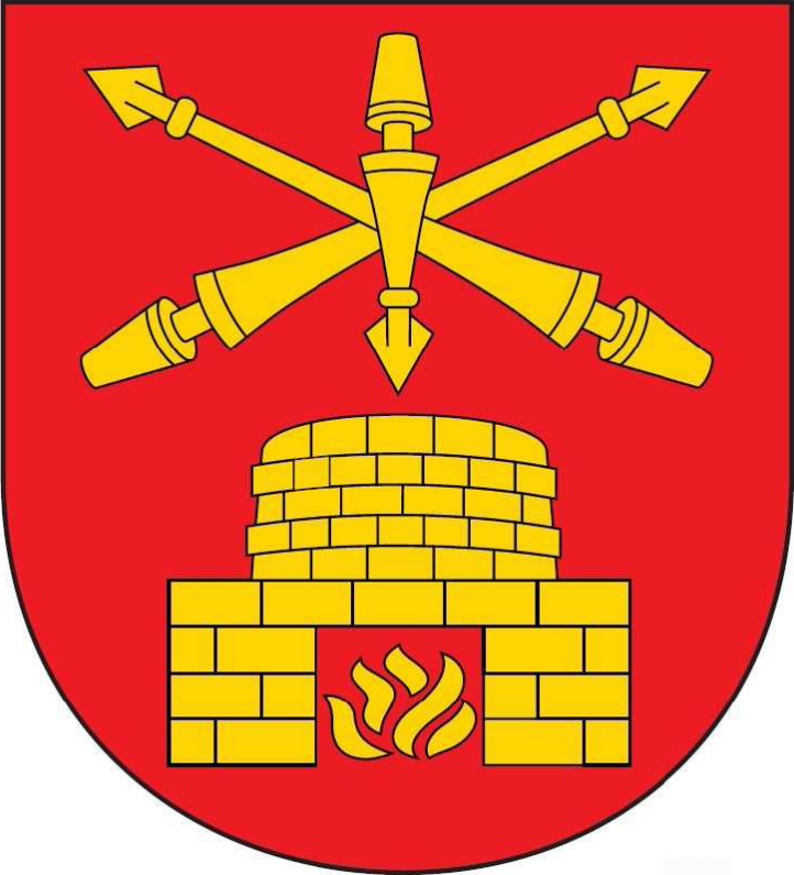 Herb gminy Aleksandrów